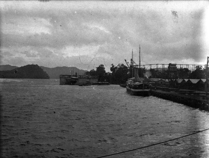 Foto. Droogdok en torpedoboten in de baai van Sabang, gefotografeerd vanaf het S.S. Oranje